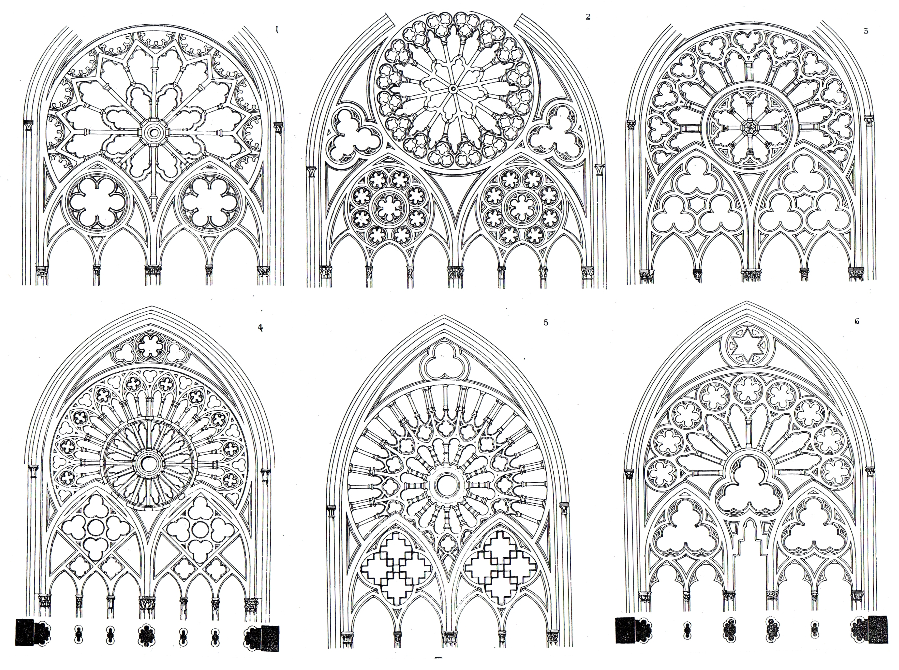 Dom Minden